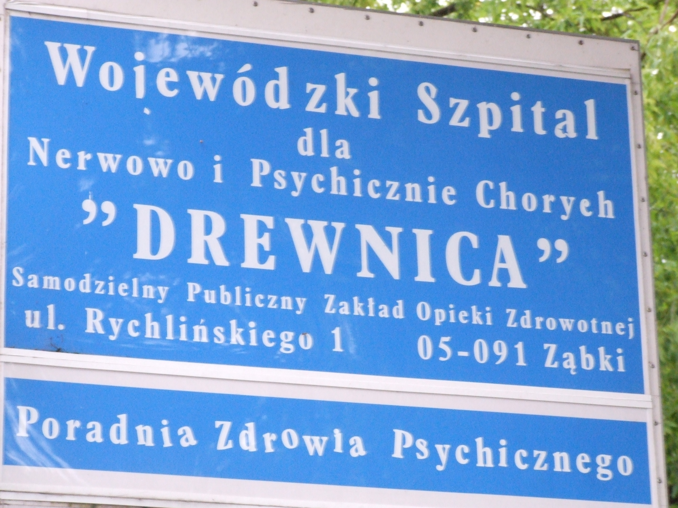 Wojewódzki Szpital dla Nerowowo i Psychicznie Chorych "Drewnica" Tablica informacyjna